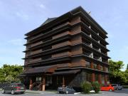 Noul Centru de Artă şi Cultură Japoneză